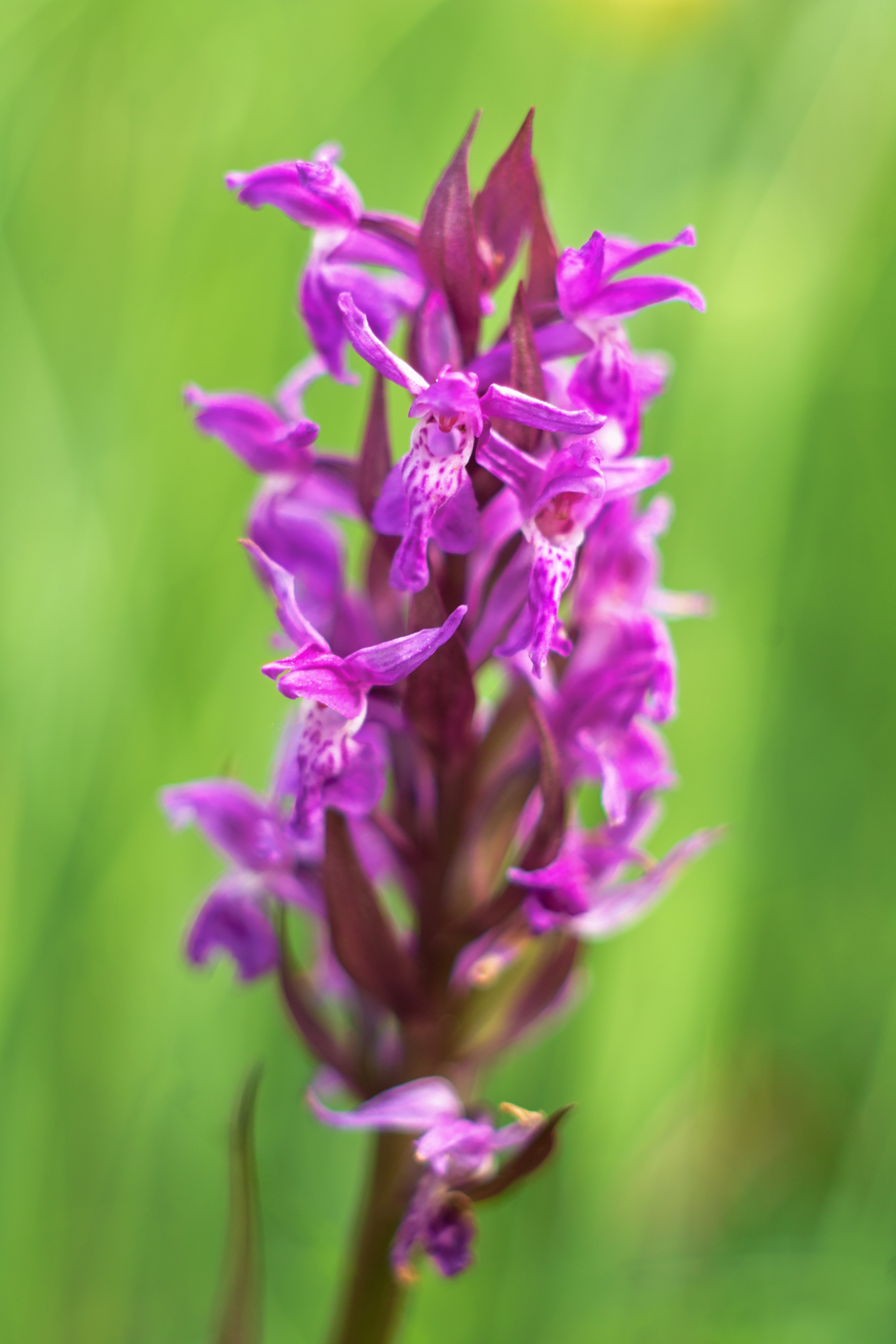 Vrbenské rybníky, vstavač májový (Orchis majalis)